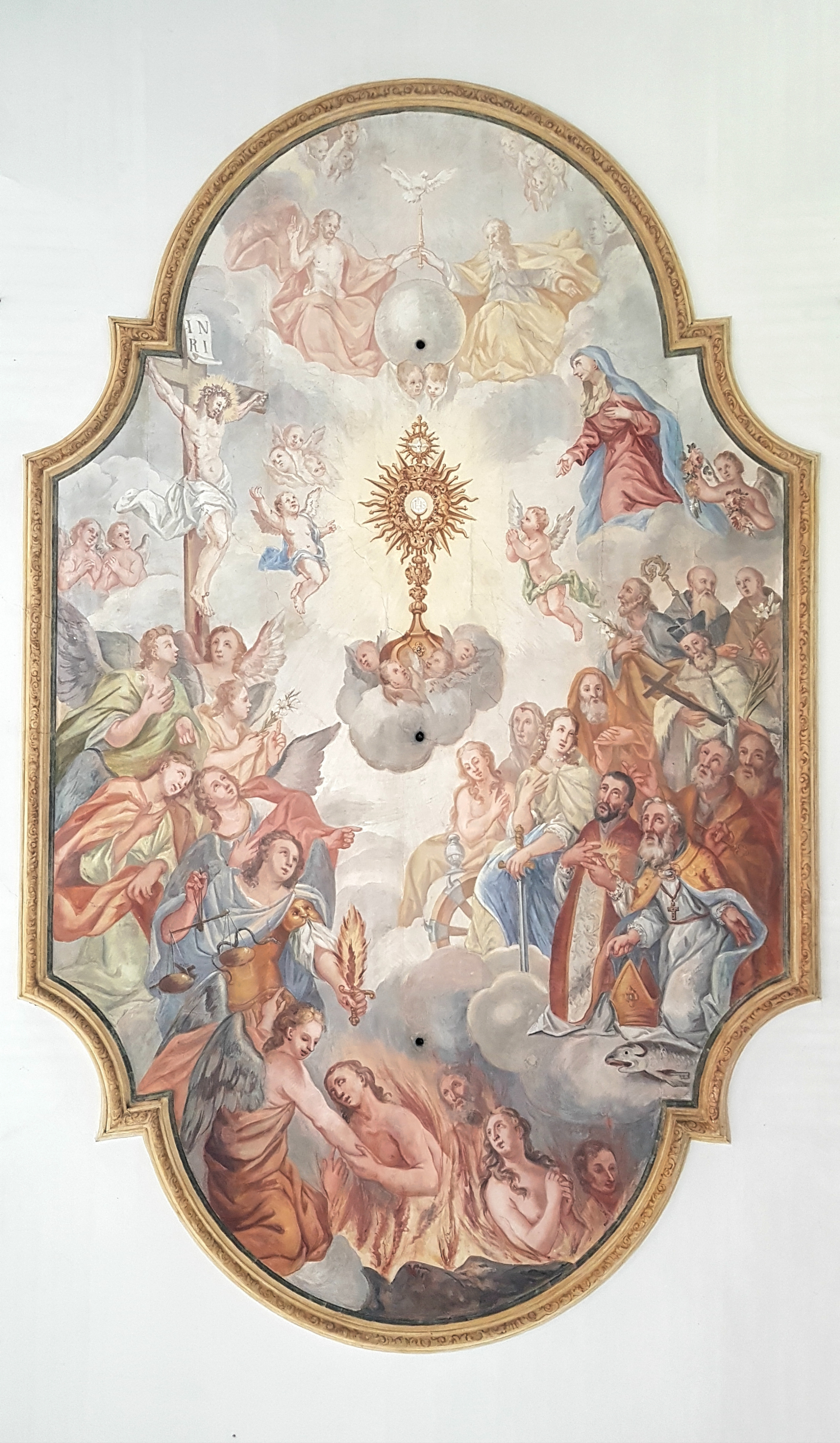 St. Ulrich (Wangen bei Starnberg)